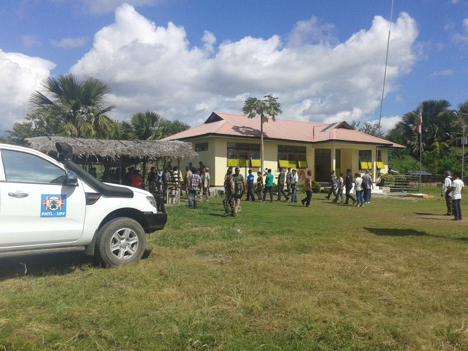 Posto de Fronteira de Citrana, Suco Beneufe